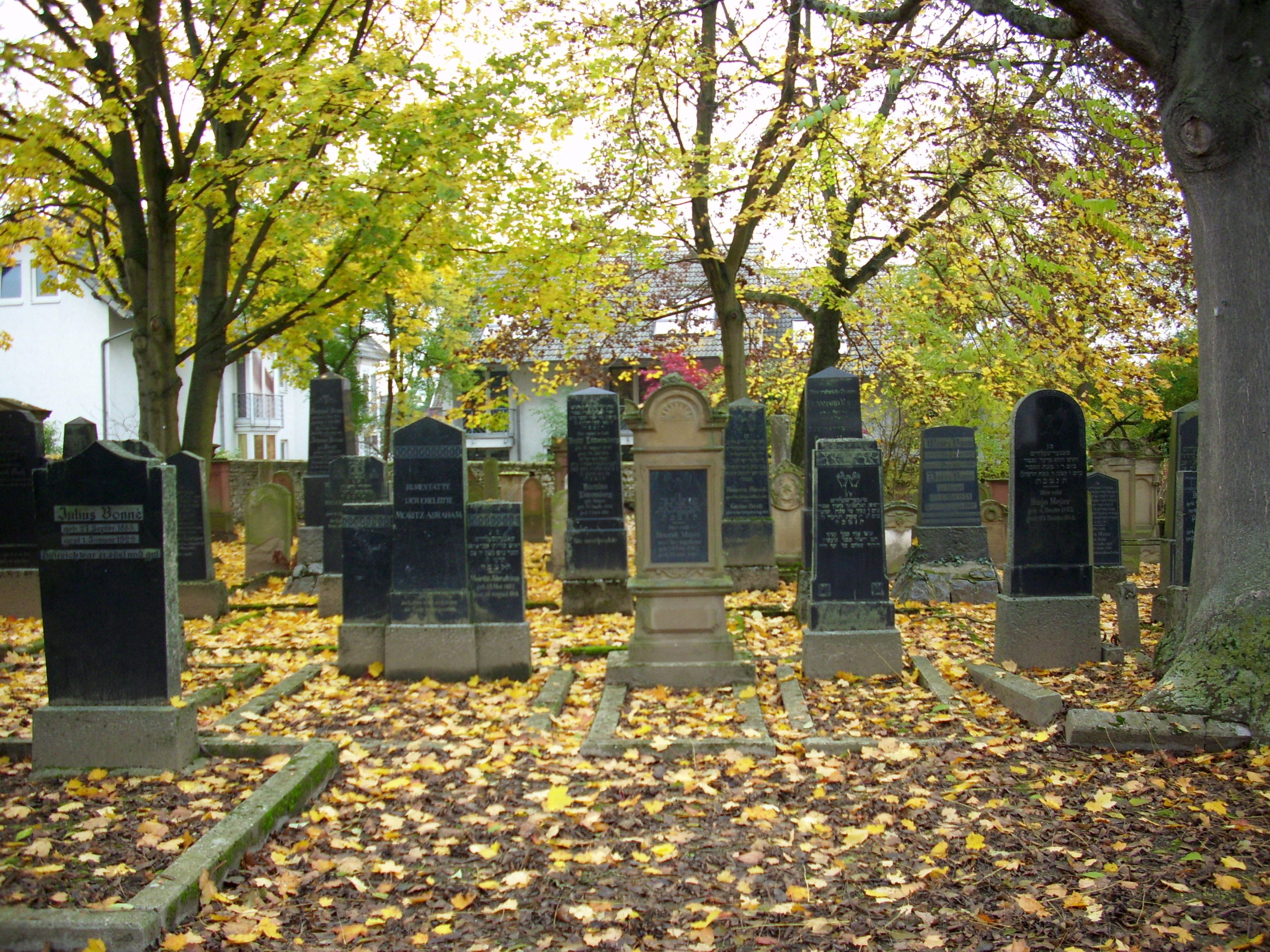 1836 angelegtes Rechteckareal, 1876 ummauert; 143 Grabsteine von 1841 bis 1938; Gräber mit Giebelverdachung, Urnenbekrönung und Levitenhände.